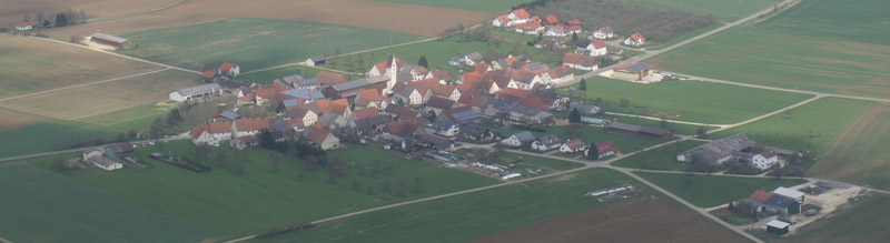 Aerial Photo of Oppingen, Nellingen, Alb-Donau-Kreis, Baden-Württemberg, Germany